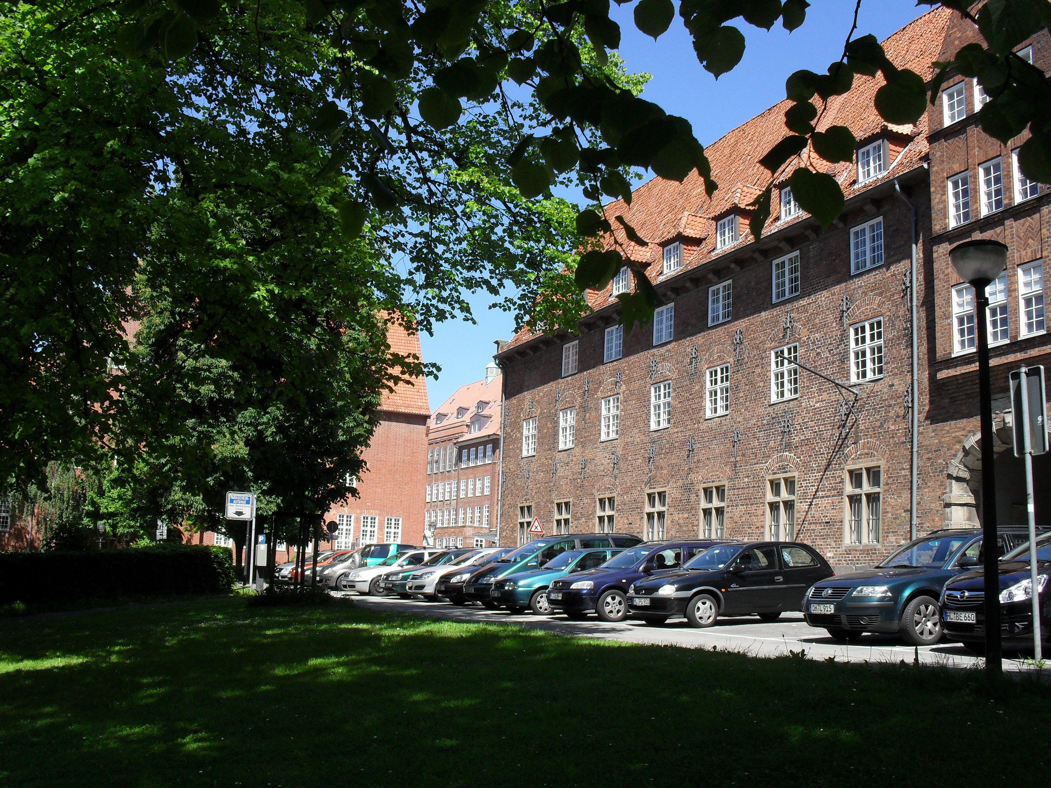 Der Große Bauhof in Lübeck